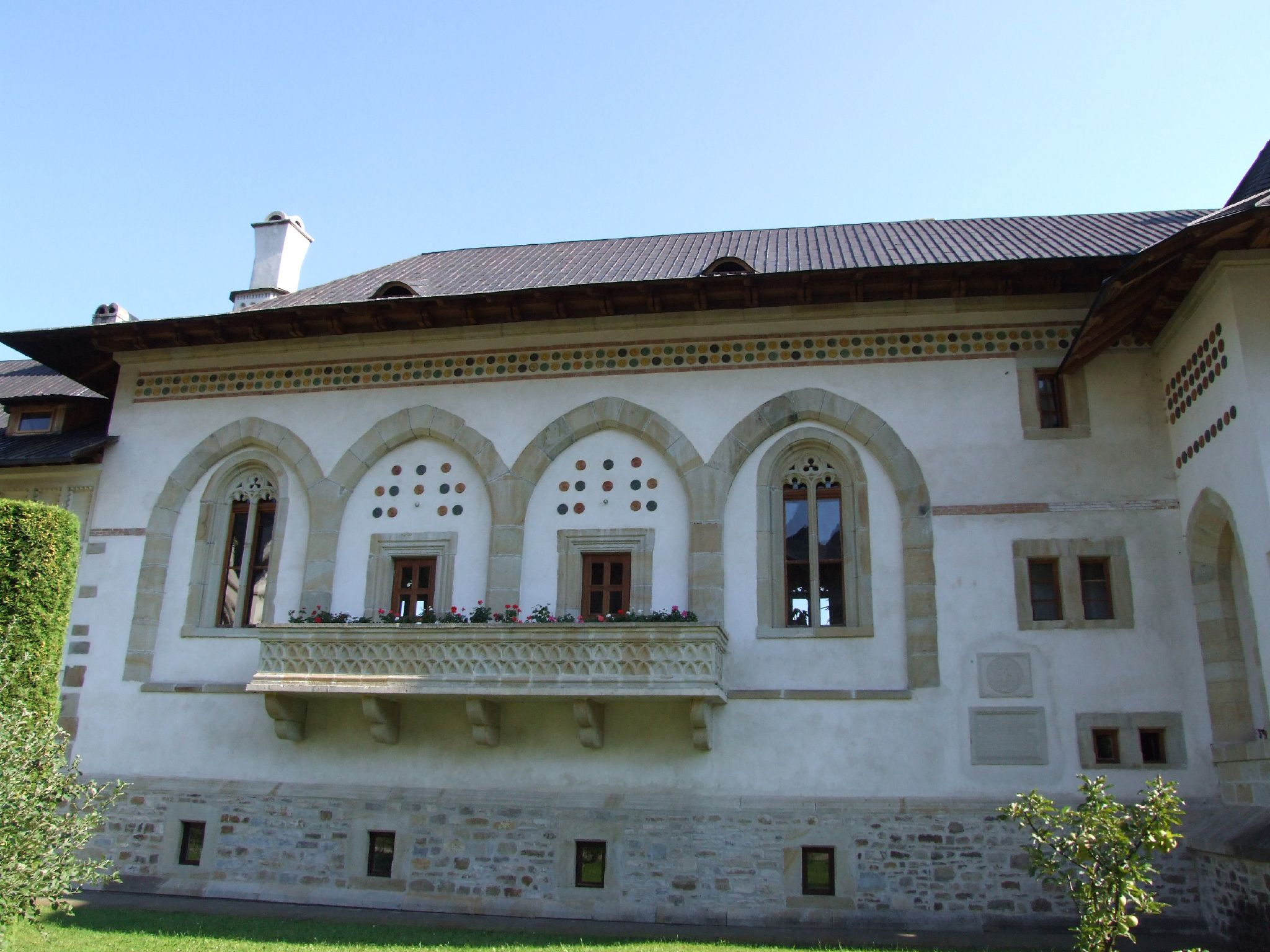 Putna -16.08.2007